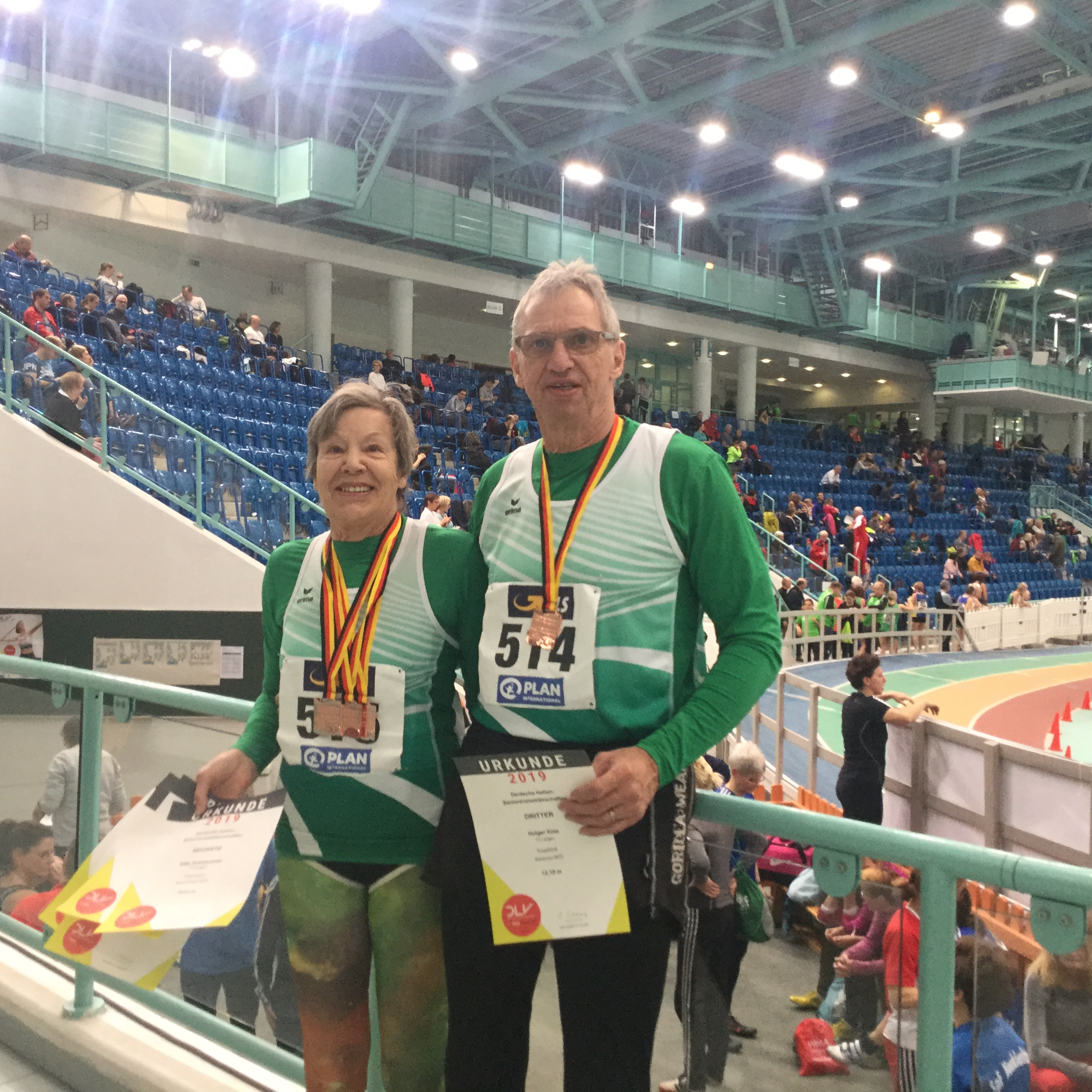 Seniorensportlerpaar bei den Deutschen Leichtathletik-Senioren-Hallenmeisterschaften 2019 in Halle (Saale).